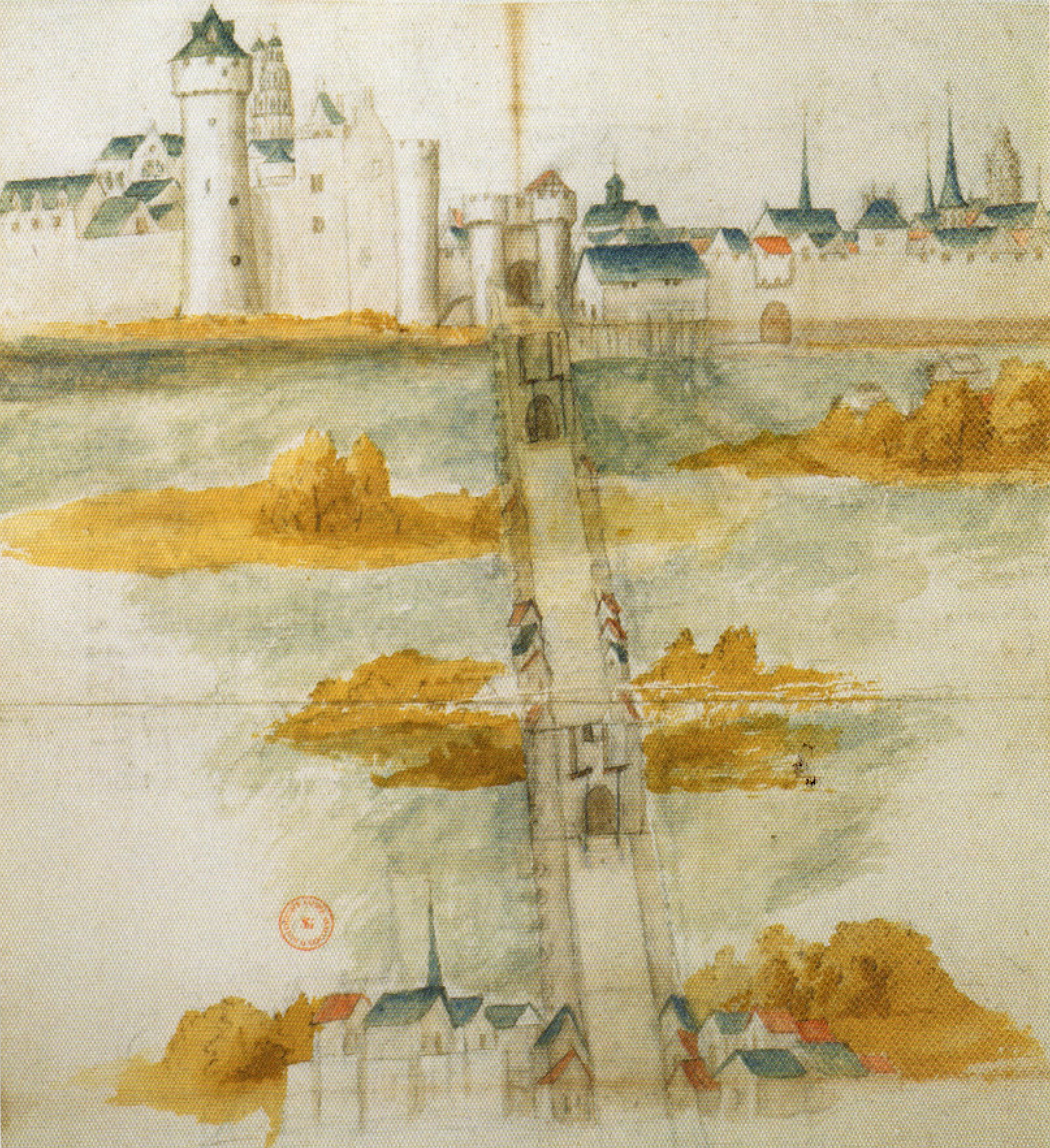 Le pont et le château de Tours du XI°° siècle, tels qu'ils subsistaient au XVII° siècle. - Aquarelle (Bibliothèque Sainte Geneviève, Paris) publiée, par exemple, dans Henri Galinié, Tours antique et médiéval, FERACF, 2007, p 298